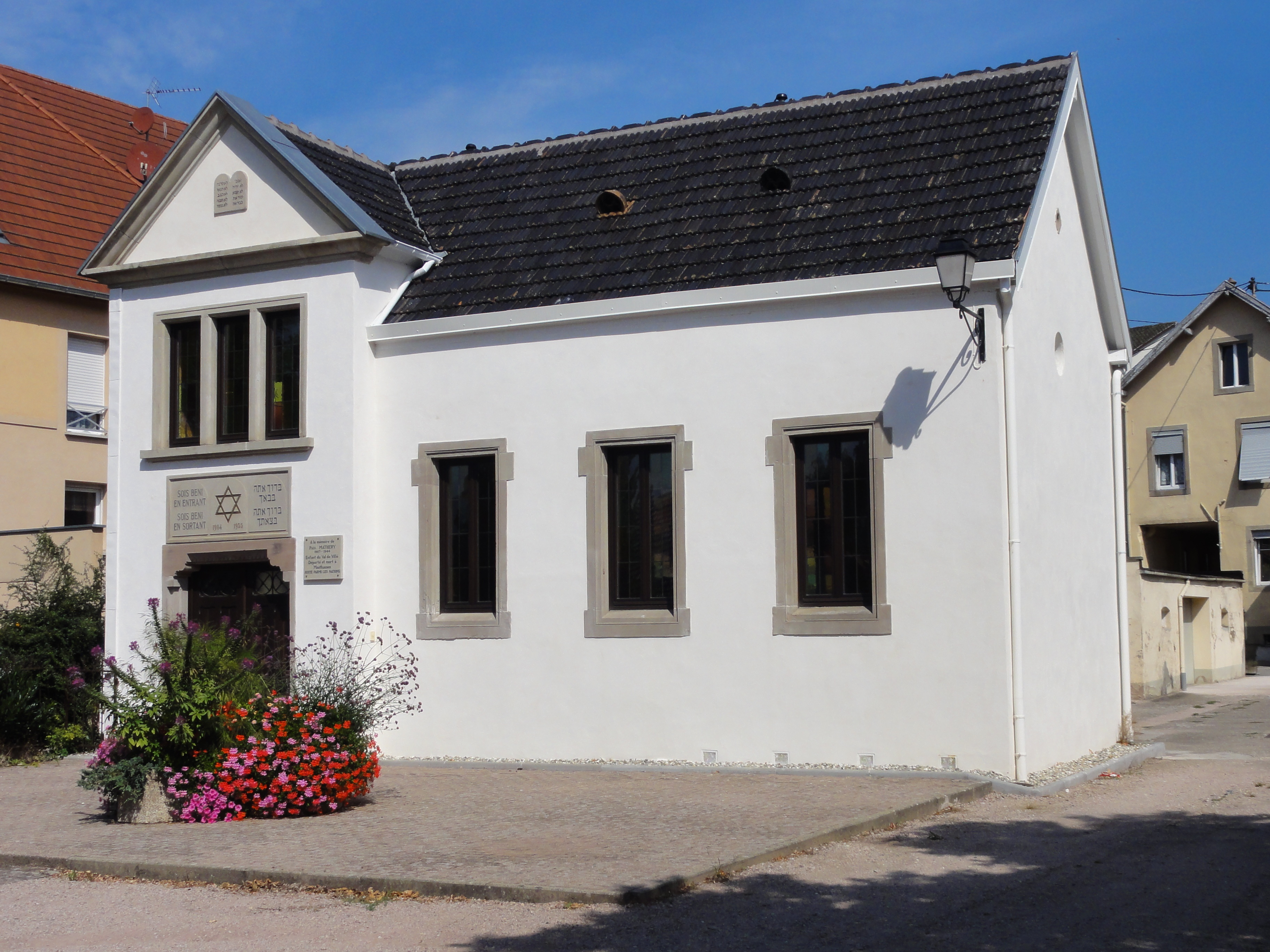 Alsace, Bas-Rhin, Villé, Synagogue (1905), place de la Liberté.